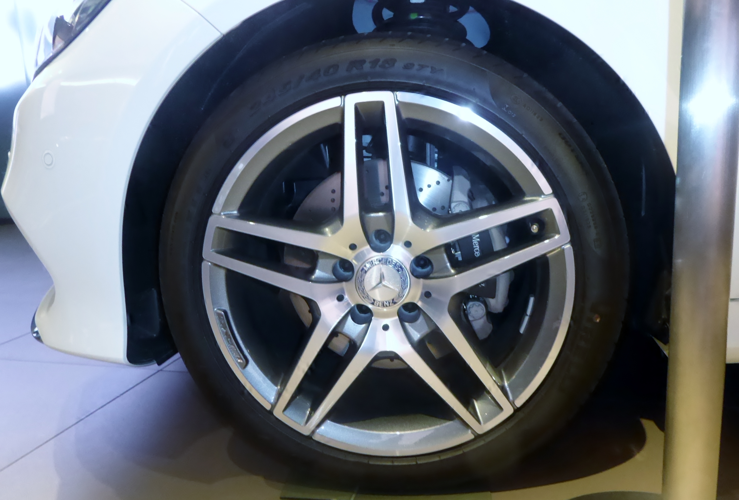 W212型メルセデス・ベンツE220ブルーテックアバンギャルドのホイールを撮影。